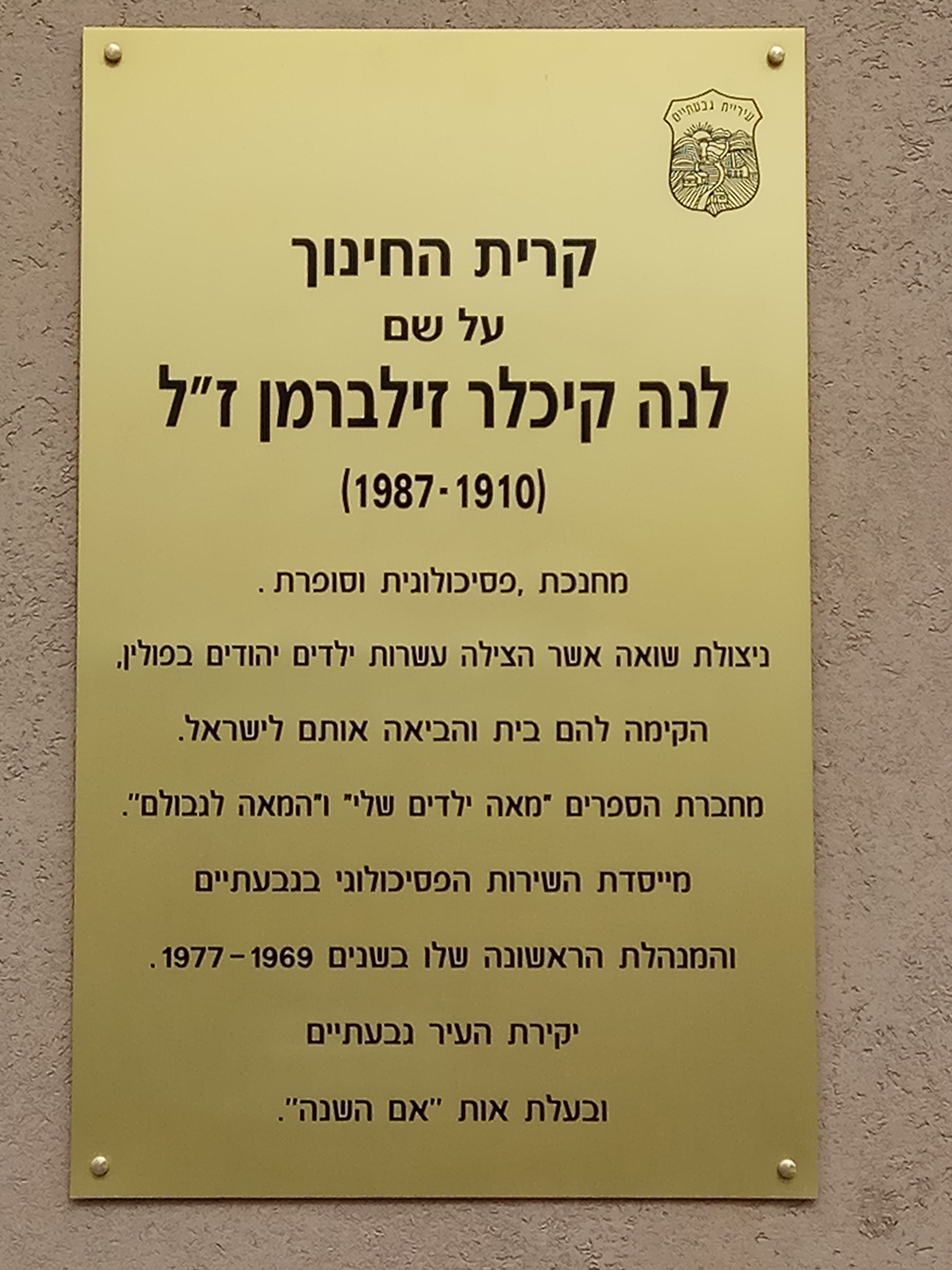 לוחית זיכרון ללנה קיכלר זילברמן ברחוב השנים מס' 3 בגבעתיים